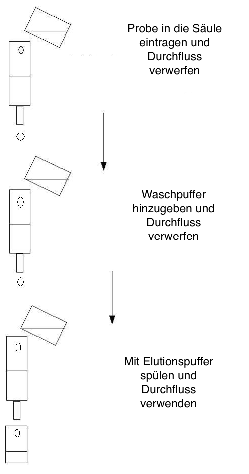 Affinitätschromatographie- Diagramm